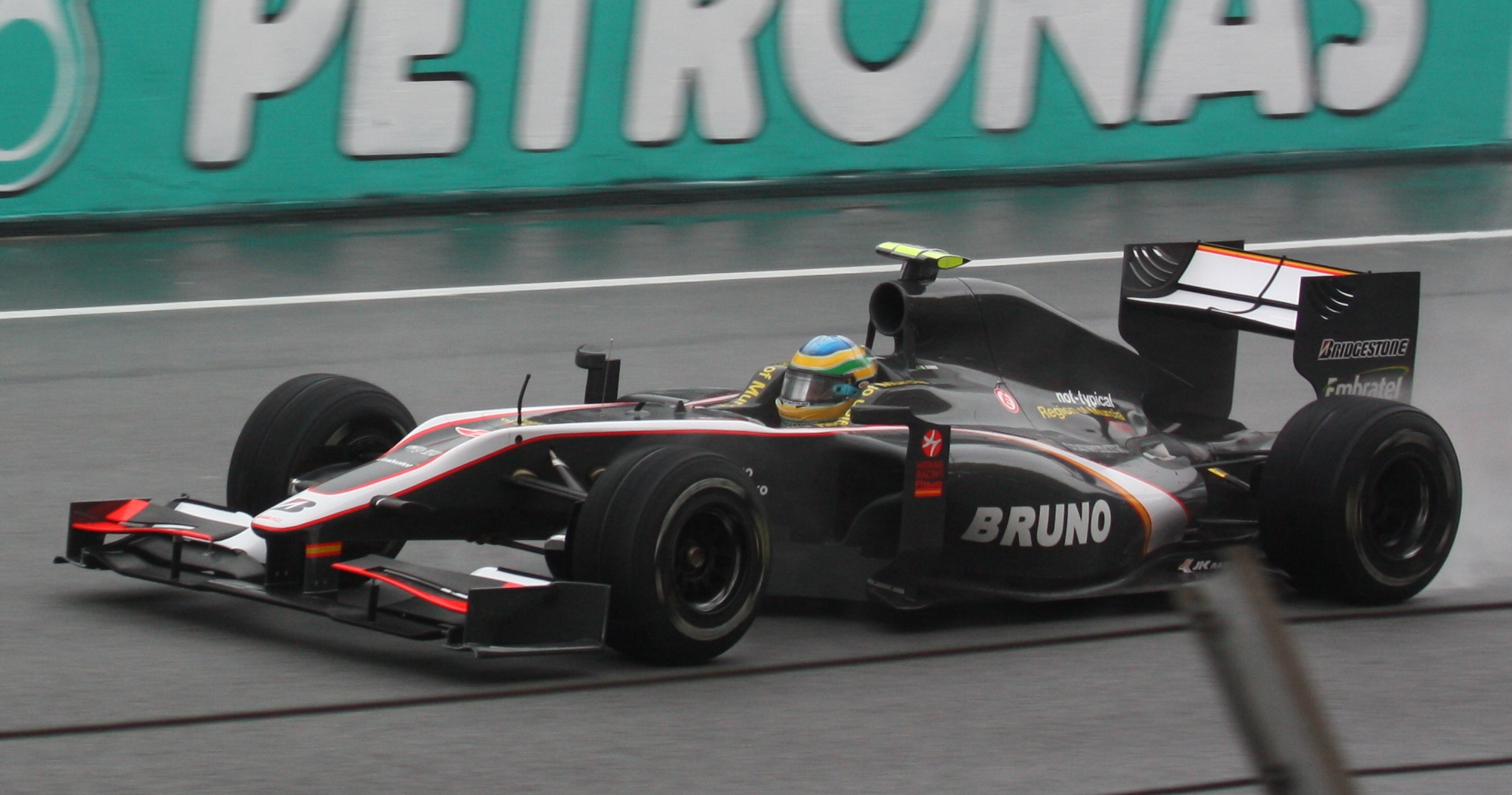 Senna during malysian qualy